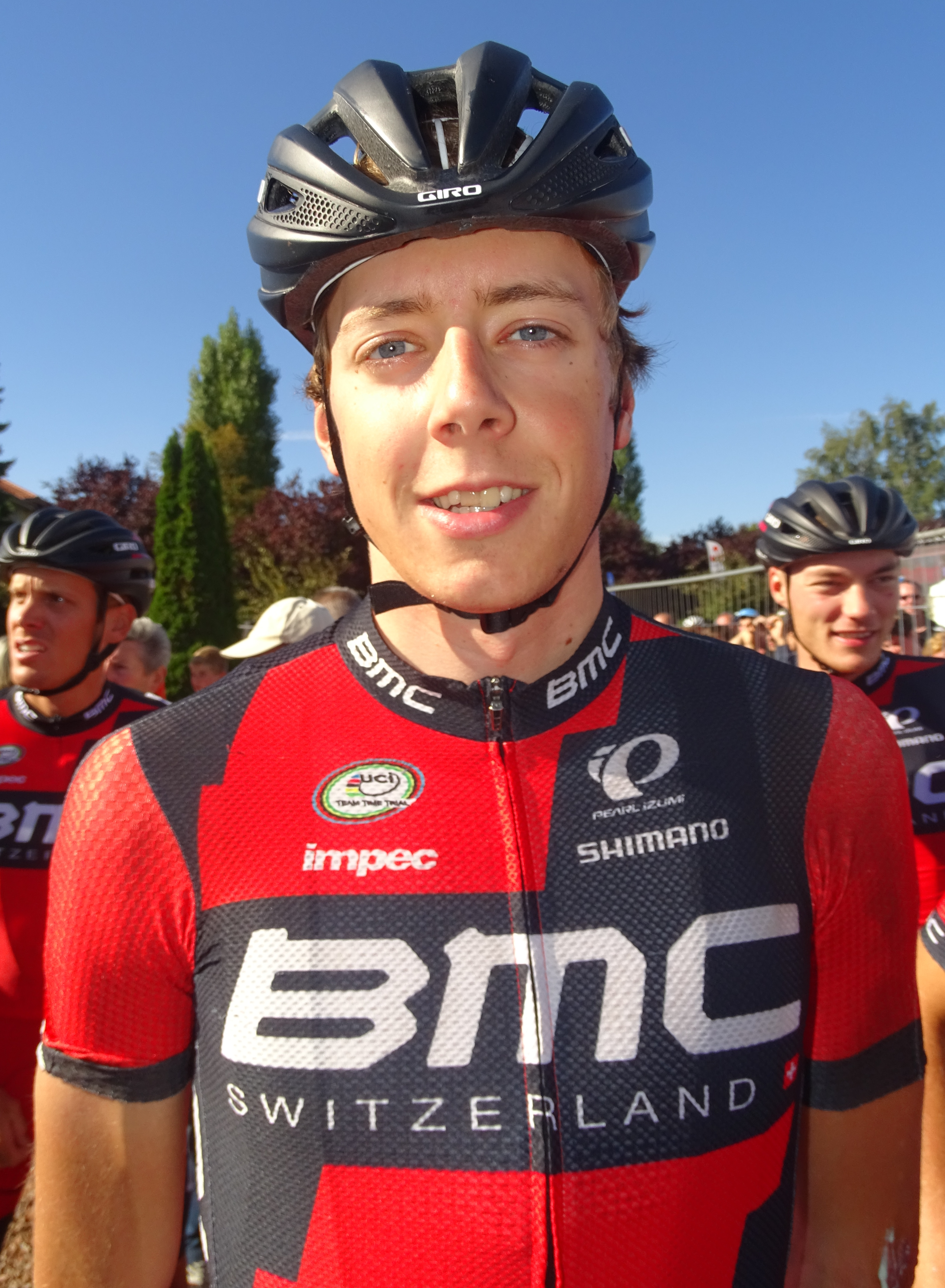 Reportage réalisé le dimanche 20 septembre à l'occasion du départ et de l'arrivée du Grand Prix d'Isbergues 2015 à Isbergues, Nord-Pas-de-Calais, France.